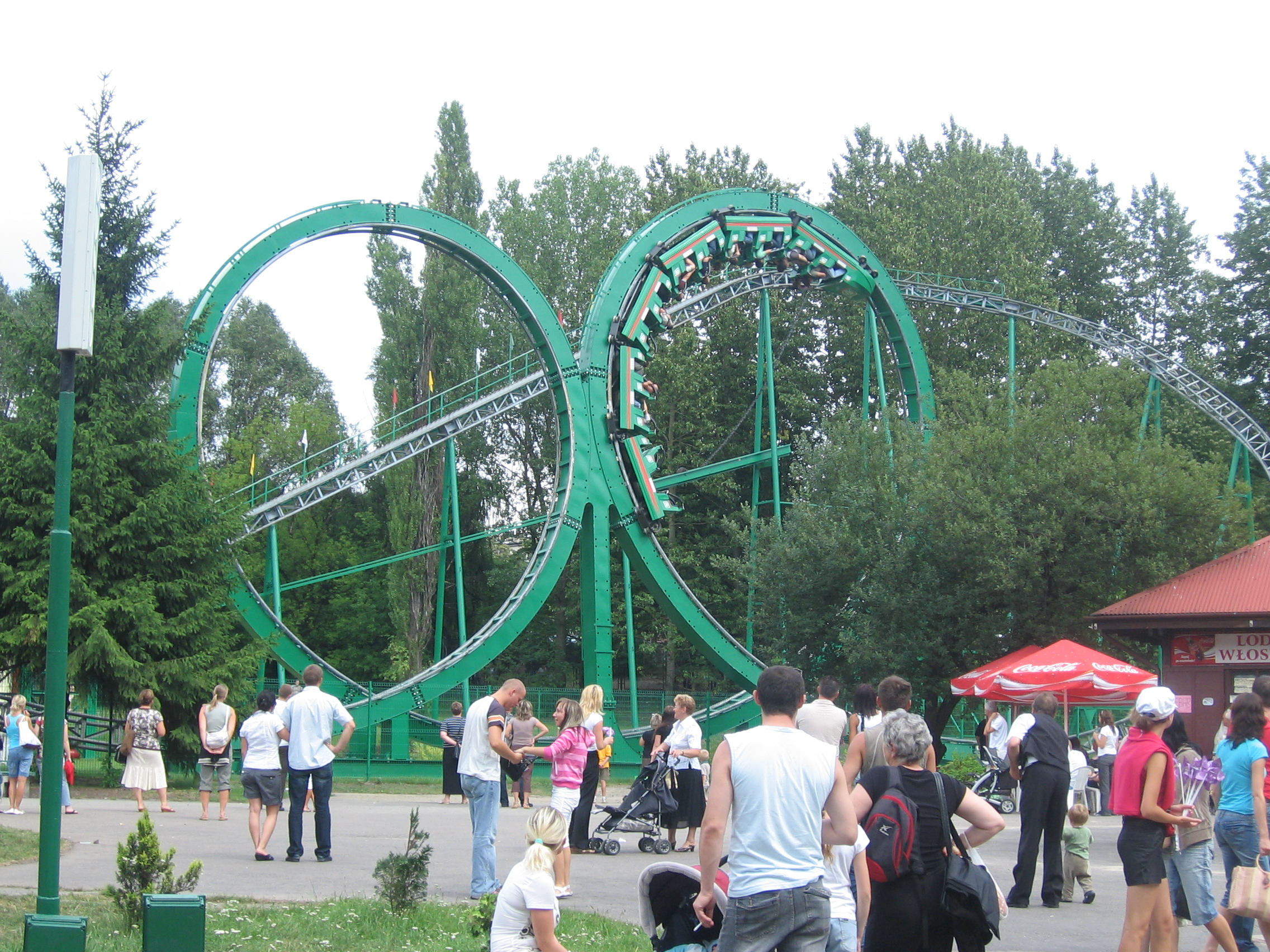 Rollercoaster Tic Tac Tornado w Śląskim Wesołym Miasteczku